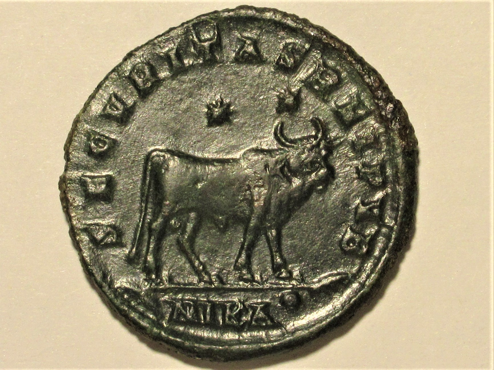 Rückseite der Münze Julianus. II mit Stier